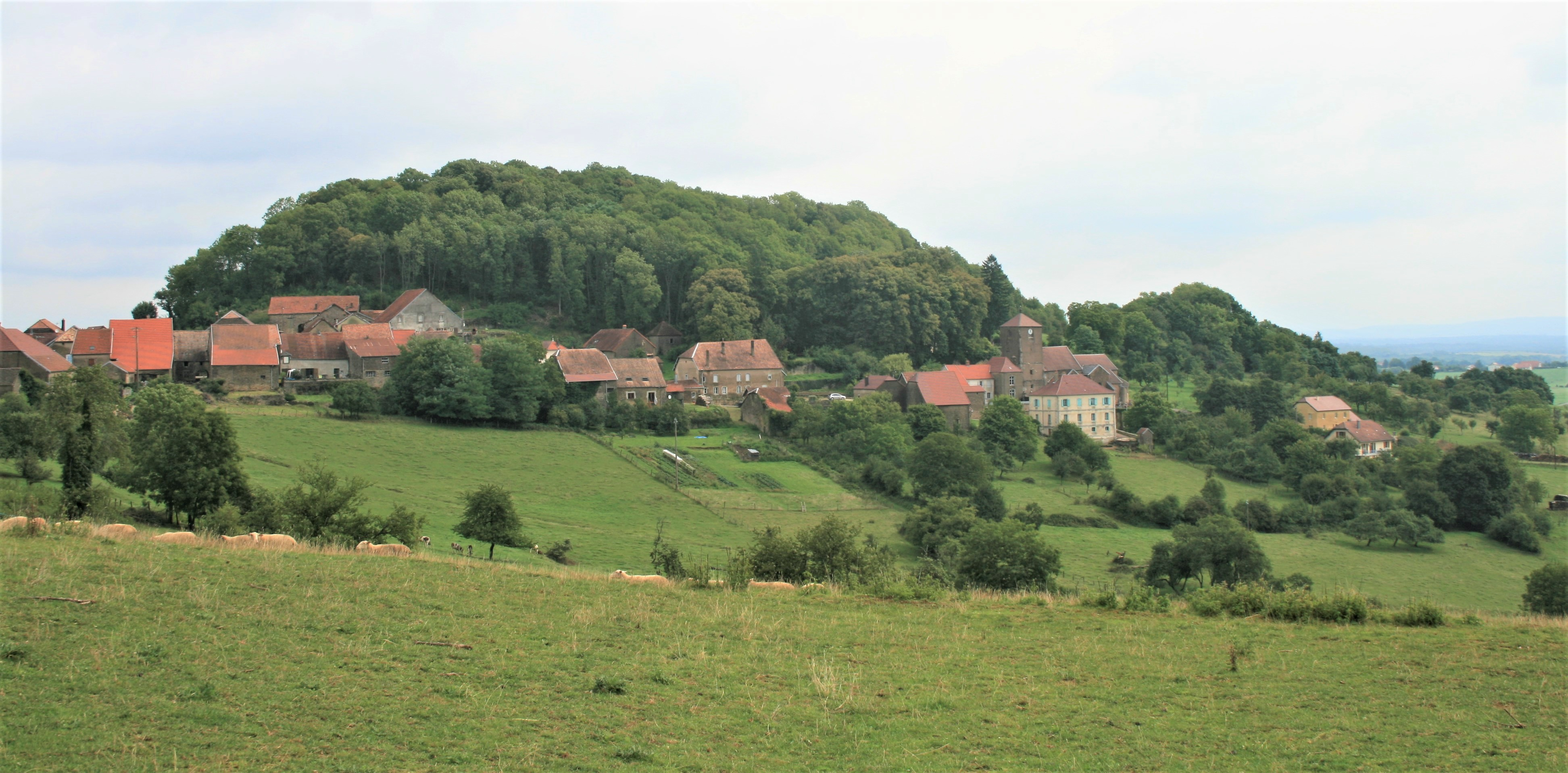 Montjustin et Velotte ( Haute-Saône) vue générale du site et du village